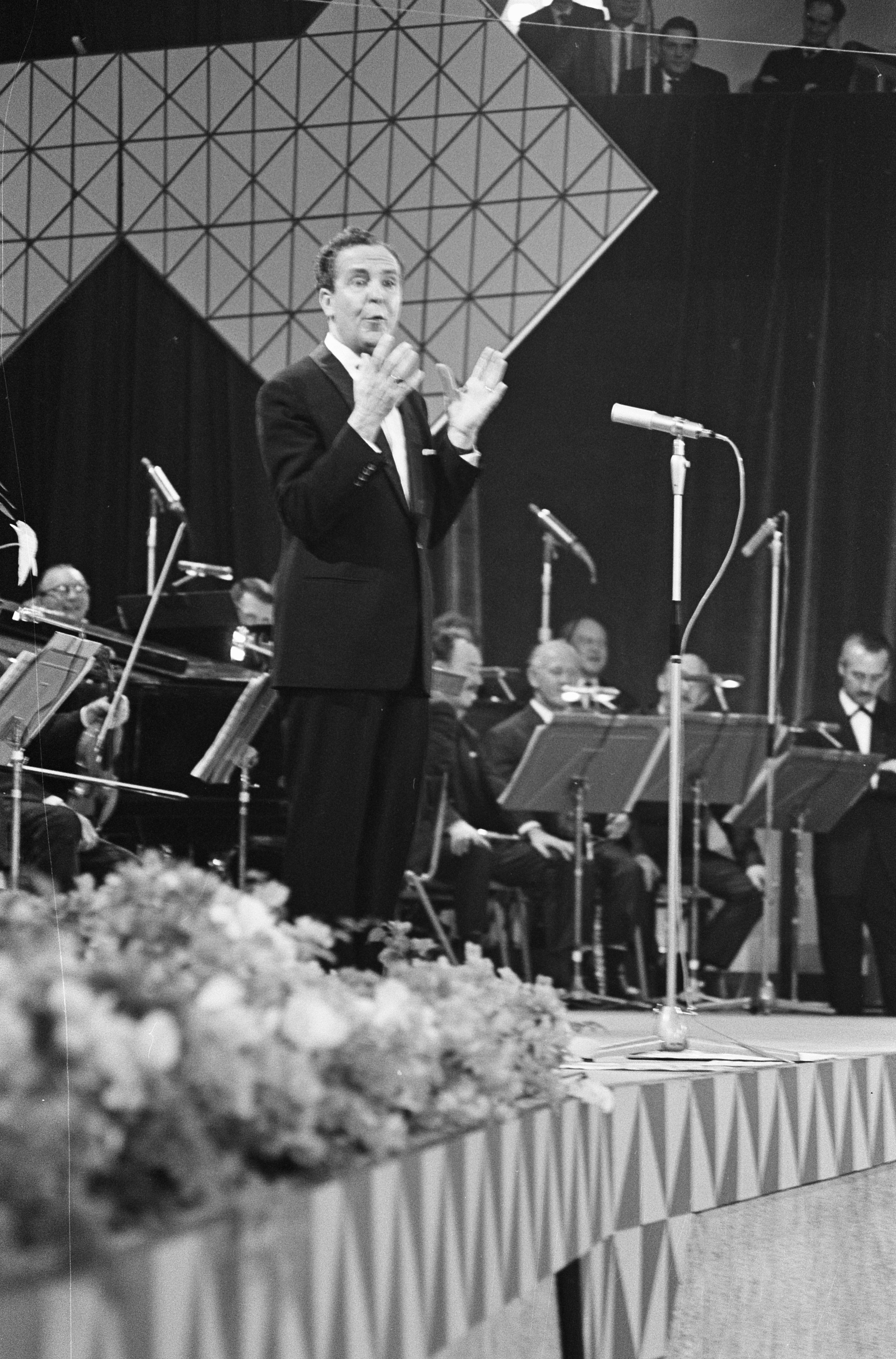 Collectie / Archief : Fotocollectie Anefo Reportage / Serie : [ onbekend ] Beschrijving : Grand Gala du Disque populier in Kurhaus te Scheveningen Wim Kan Datum : 12 oktober 1963 Locatie : Scheveningen, Zuid-Holland Persoonsnaam : Kan, Wim Fotograaf : Koch, Eric / Anefo Auteursrechthebbende : Nationaal Archief Materiaalsoort : Negatief (zwart/wit) Nummer archiefinventaris : bekijk toegang 2.24.01.05 Bestanddeelnummer : 915-6262